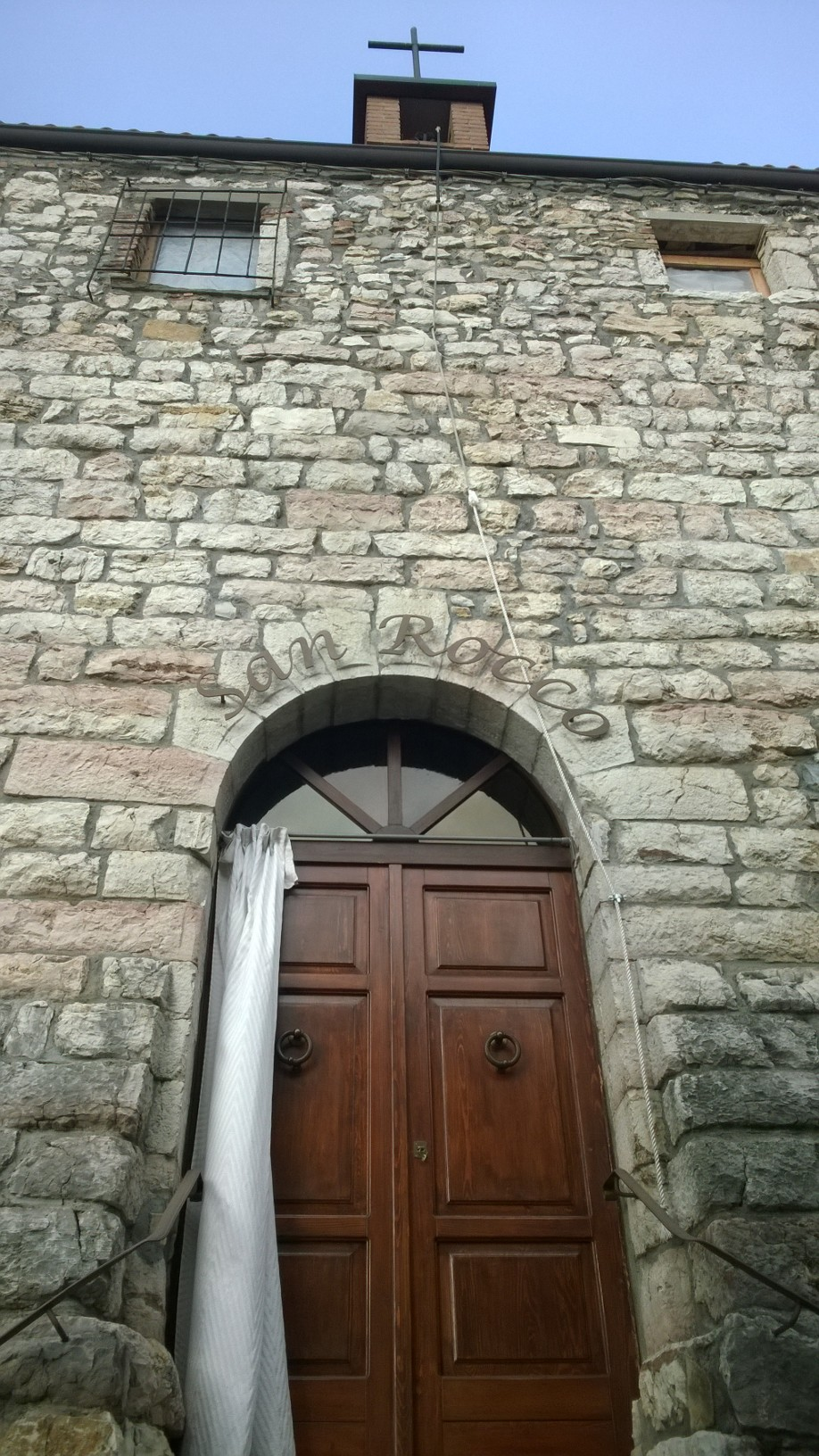 Chiesa San Rocco in Lerano, a Viadanica